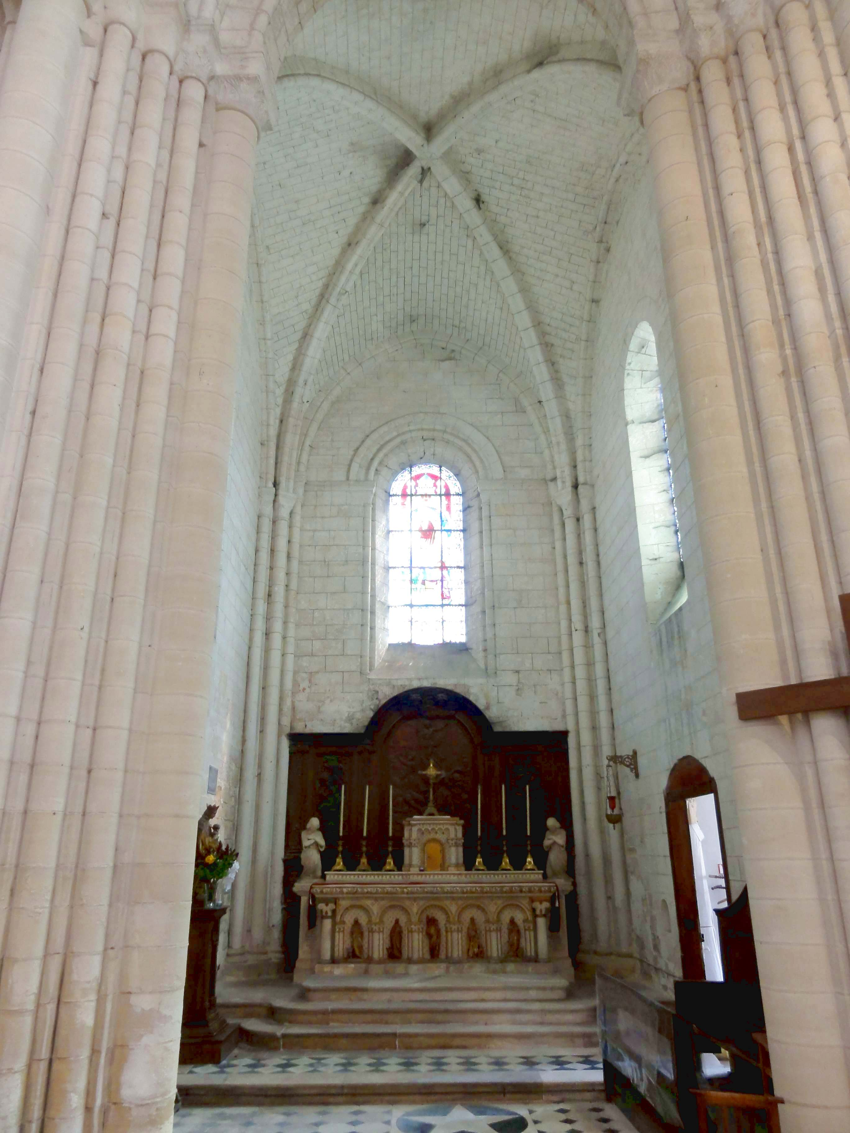 Intérieur de l'église - voir titre.